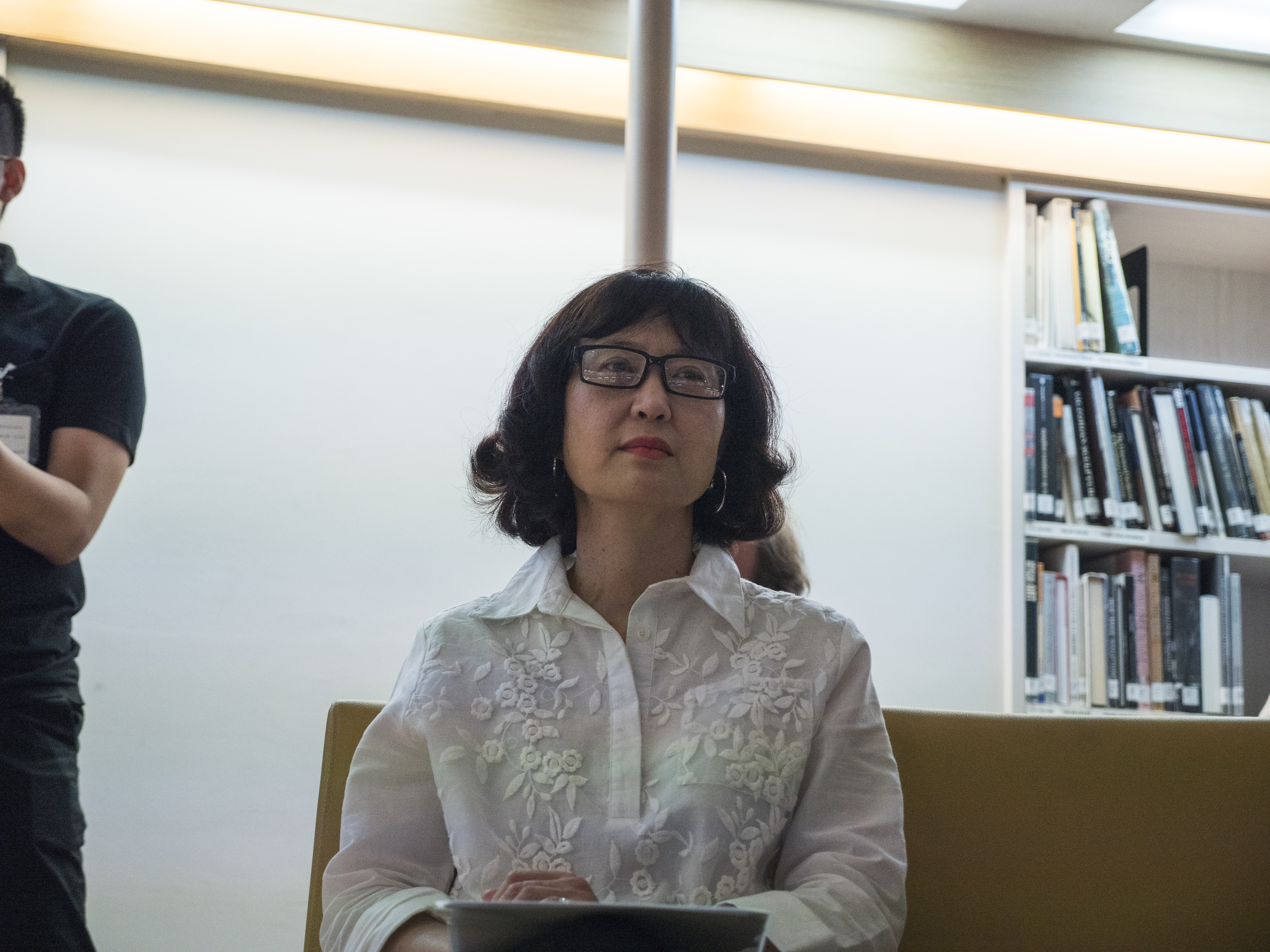 臺北市立美術館館長林平